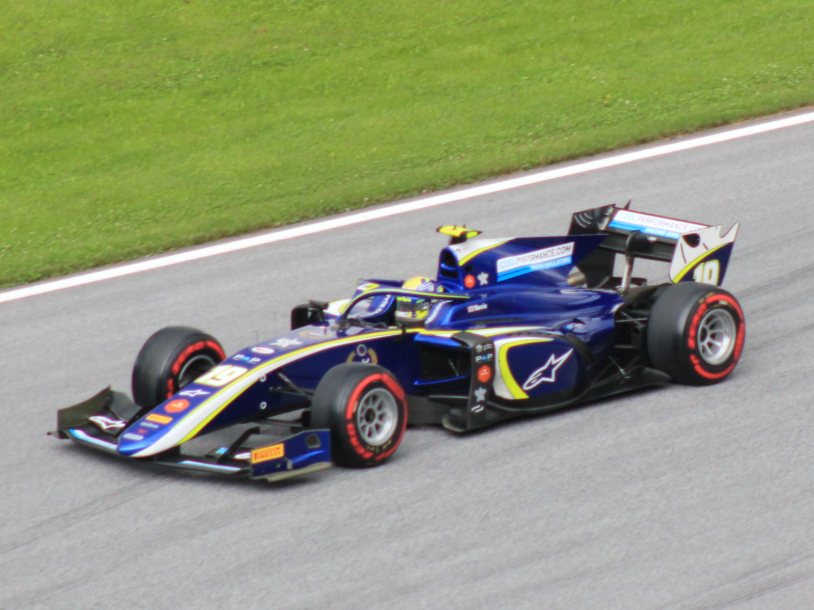 19 Lando Norris beim Rennwochenende in Österreich 2018 (1)